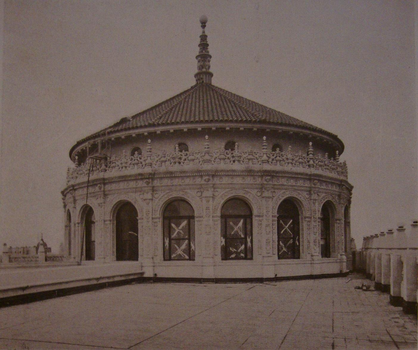 La cúpula del edificio construido para el Banco de Boston (hoy Standard Bank) en el cruce de la Avenida Roque Sáenz Peña y las calles Florida y Bartolomé Mitre. Fue inaugurado en 1924 y proyectado por los arquitectos Chambers & Thomas.